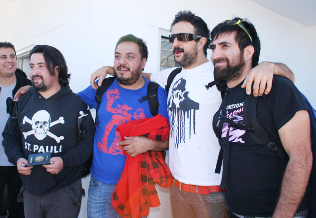 El grupo Molotov en Managua, Nicaragua.